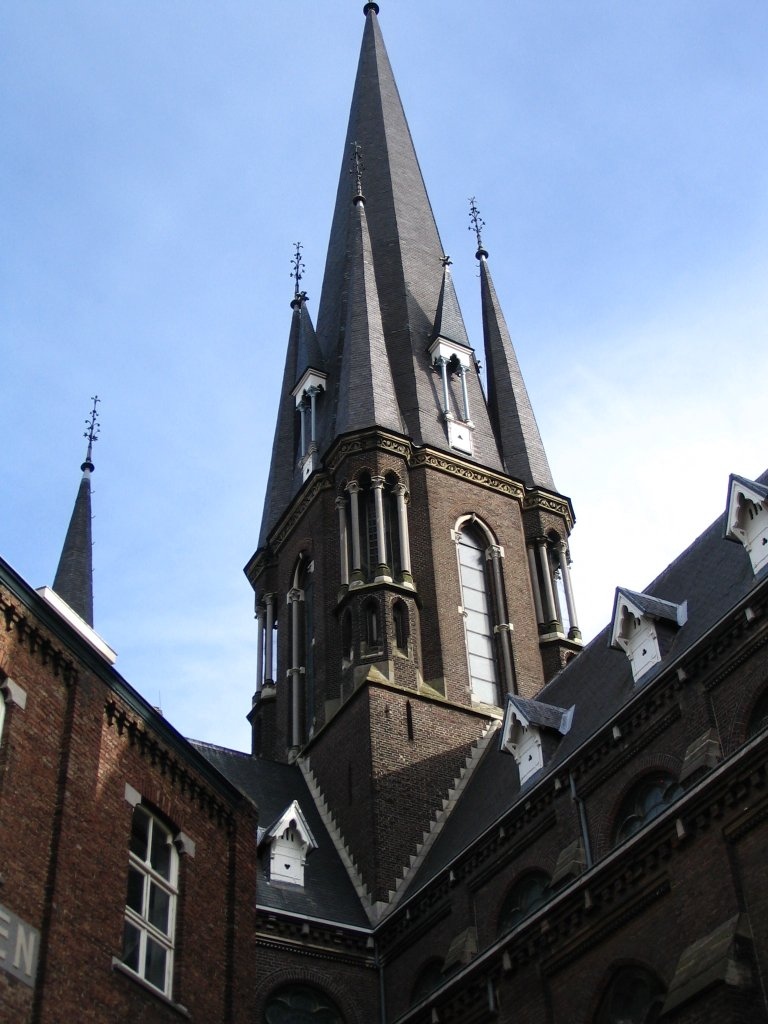 De Basiliek van O.L.V. van het Heilig Hart is een katholieke bedevaartskerk aan de Oude Markt in het historisch centrum van Sittard. Foto: J.A.Castro, Sittard